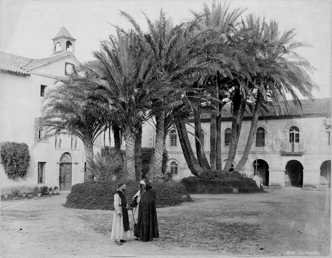 La Trappe Notre-Dame de Staoüeli